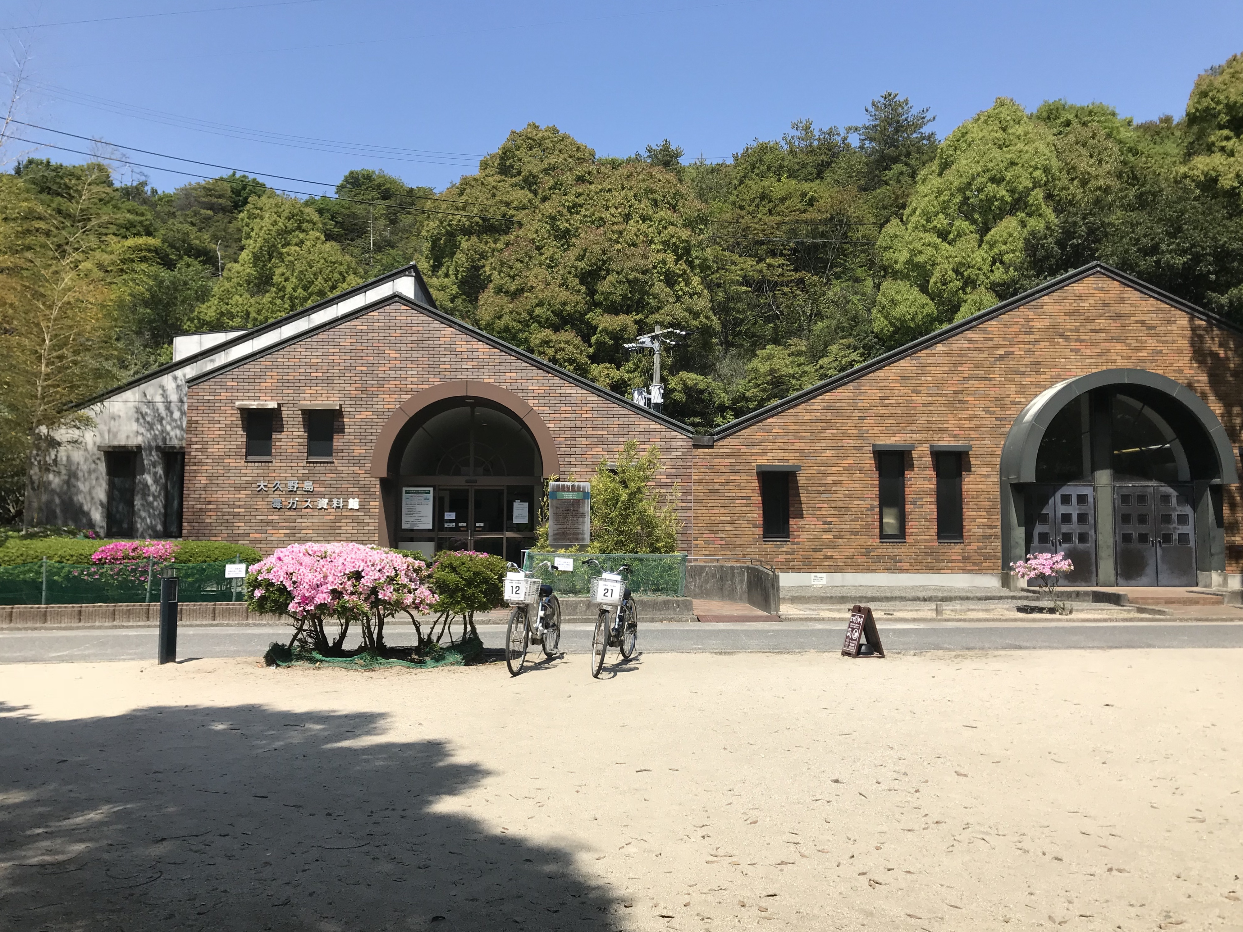 大久野島毒ガス資料館の遠景